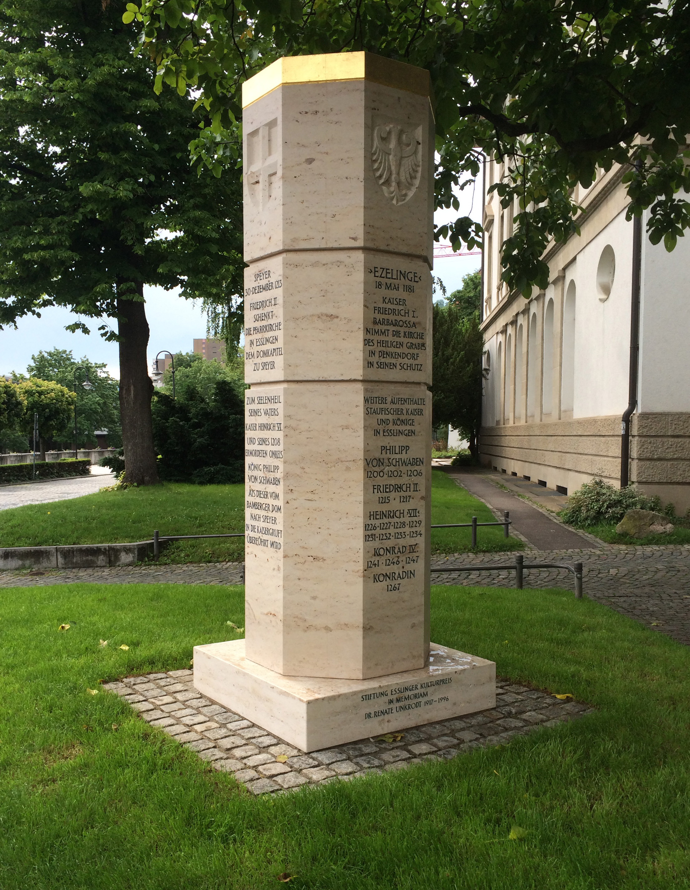 Stauferstele in Esslingen am Neckar vor der Abt-Fulrad-Straße 3.